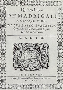 Title page of Luzzascho Luzzaschi's Quinto libero dei madrigali (first edition)